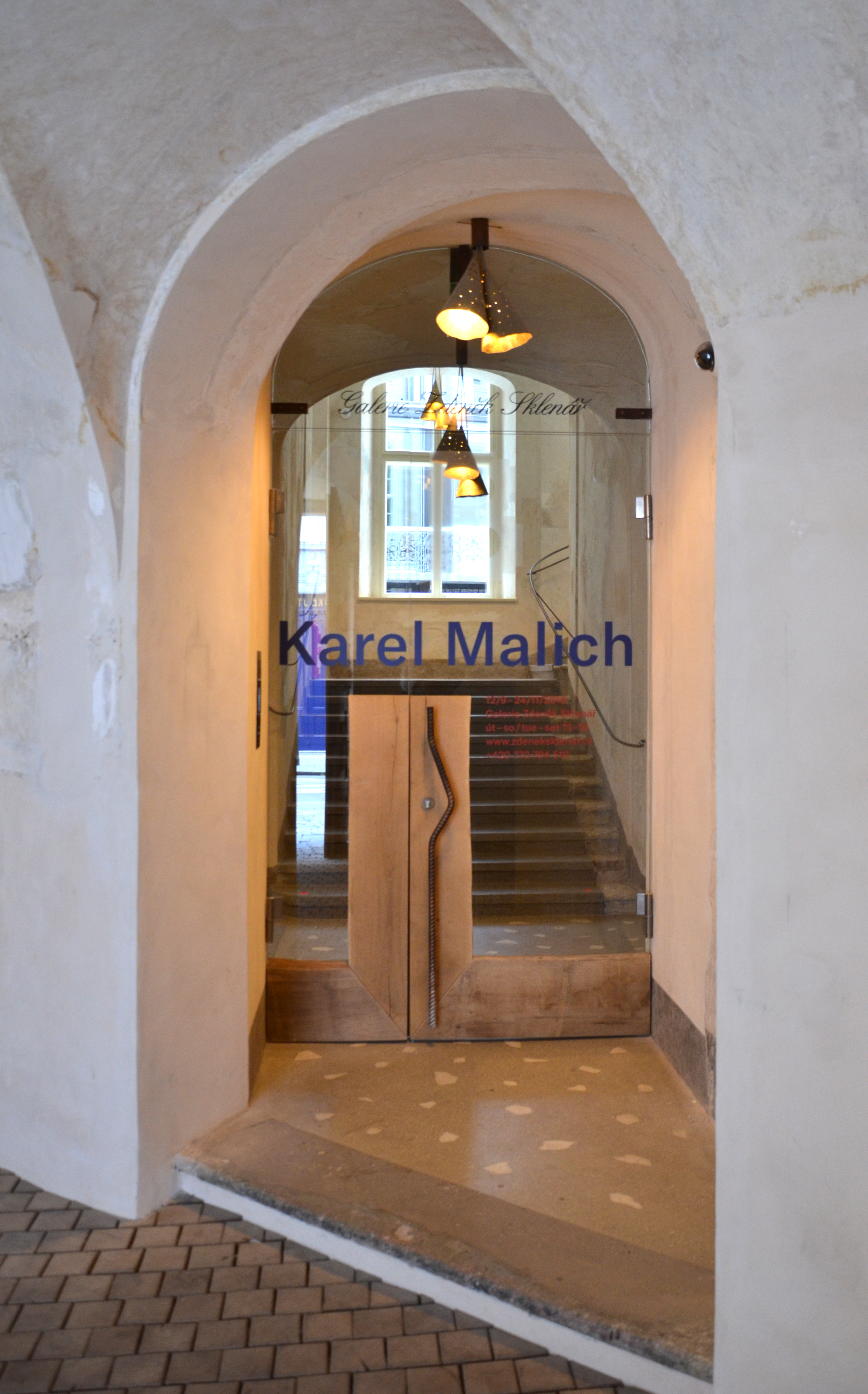 Galerie Zdeněk Sklenář, Mikulandská 7, Praha 1